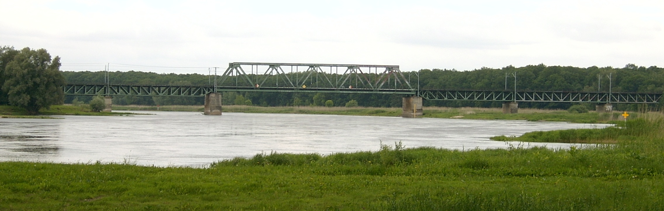 Eisenbahnbrücken-Grenzübergang Frankfurt (Oder) - Słubice/Świecko